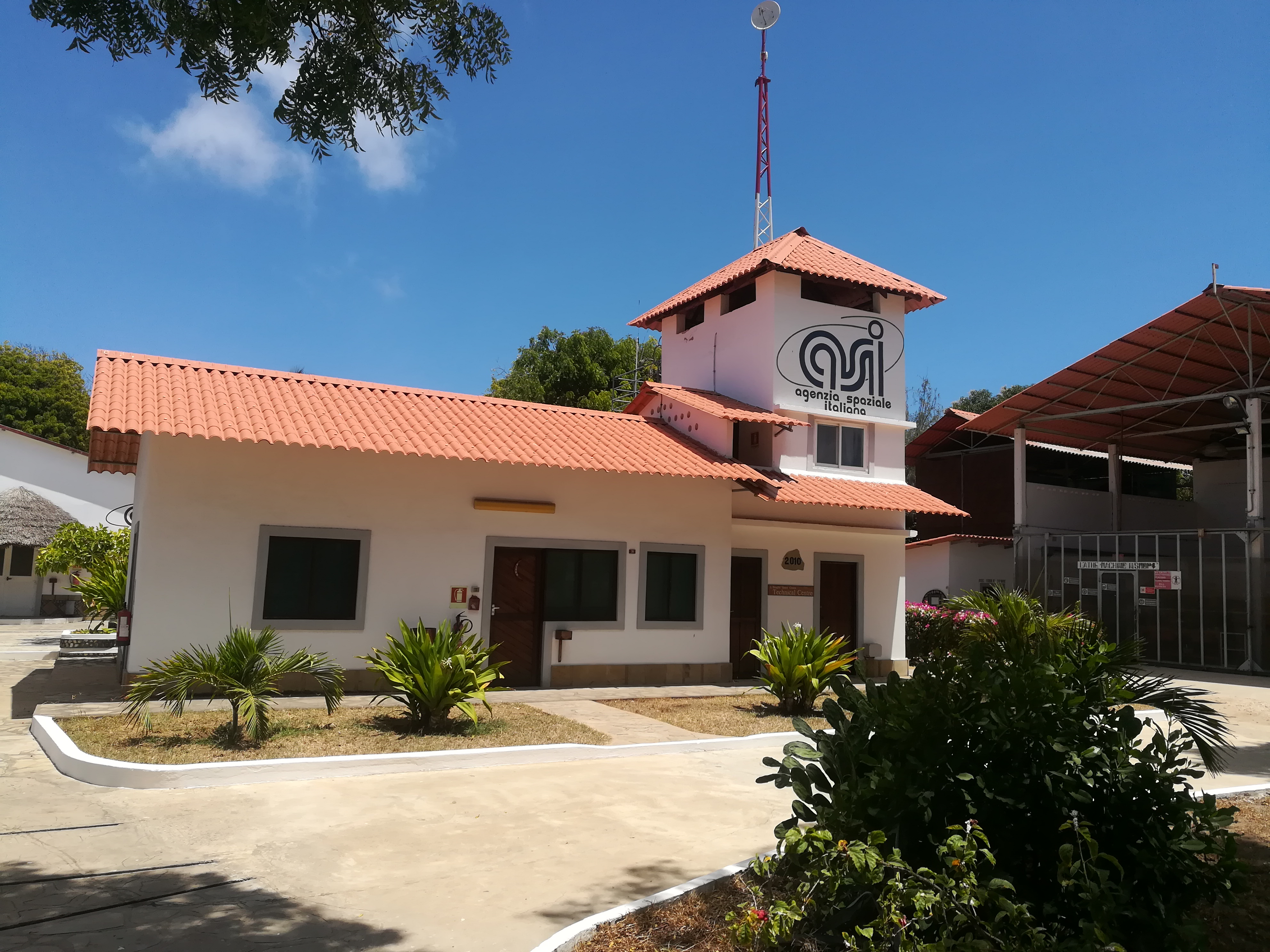 Broglio Space Centre